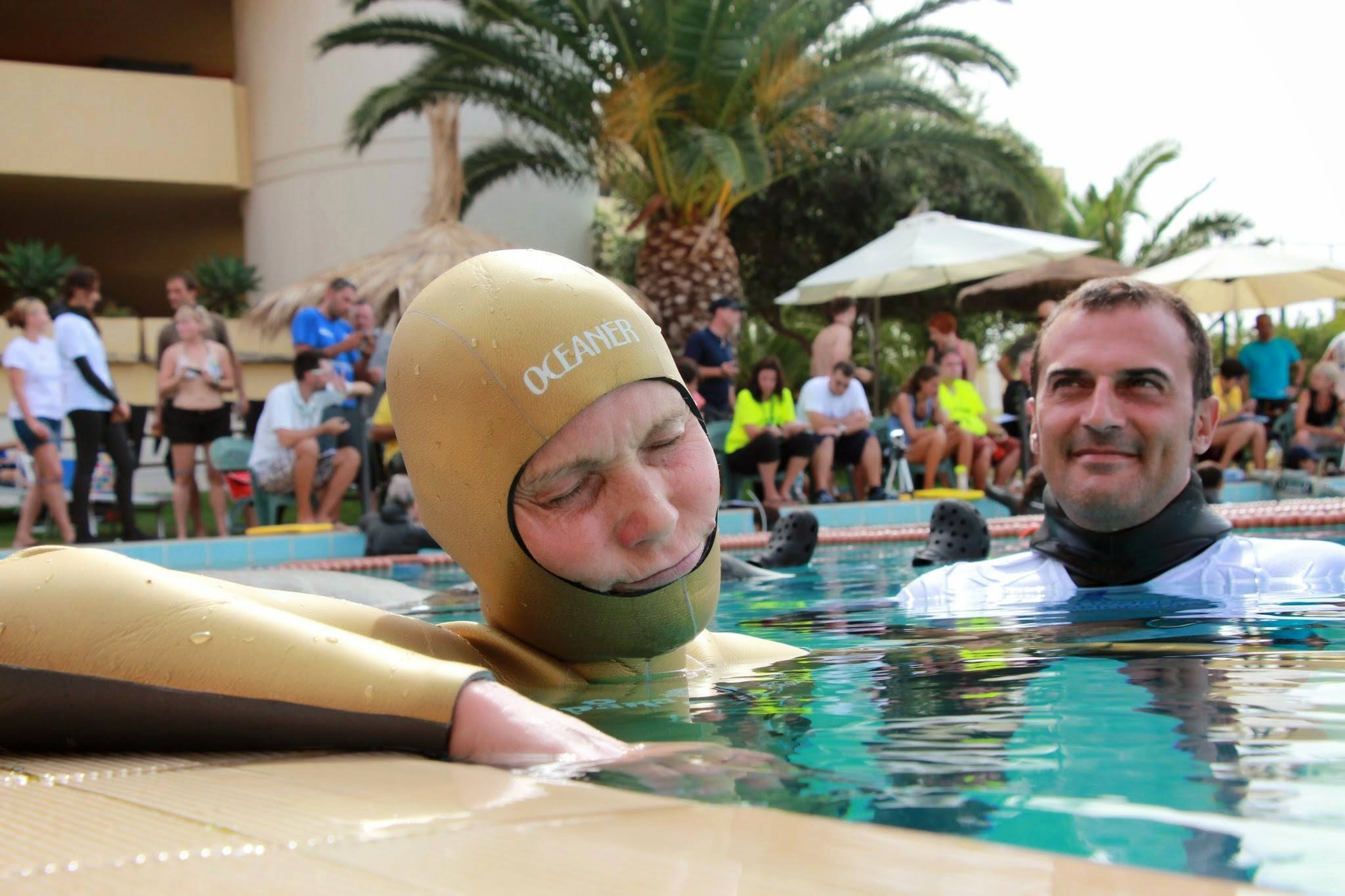 Чемпионат мира по фридайвингу в командном зачете. Италия. Сардиния 2014 г. Разминочная серия статического апное перед стартом.